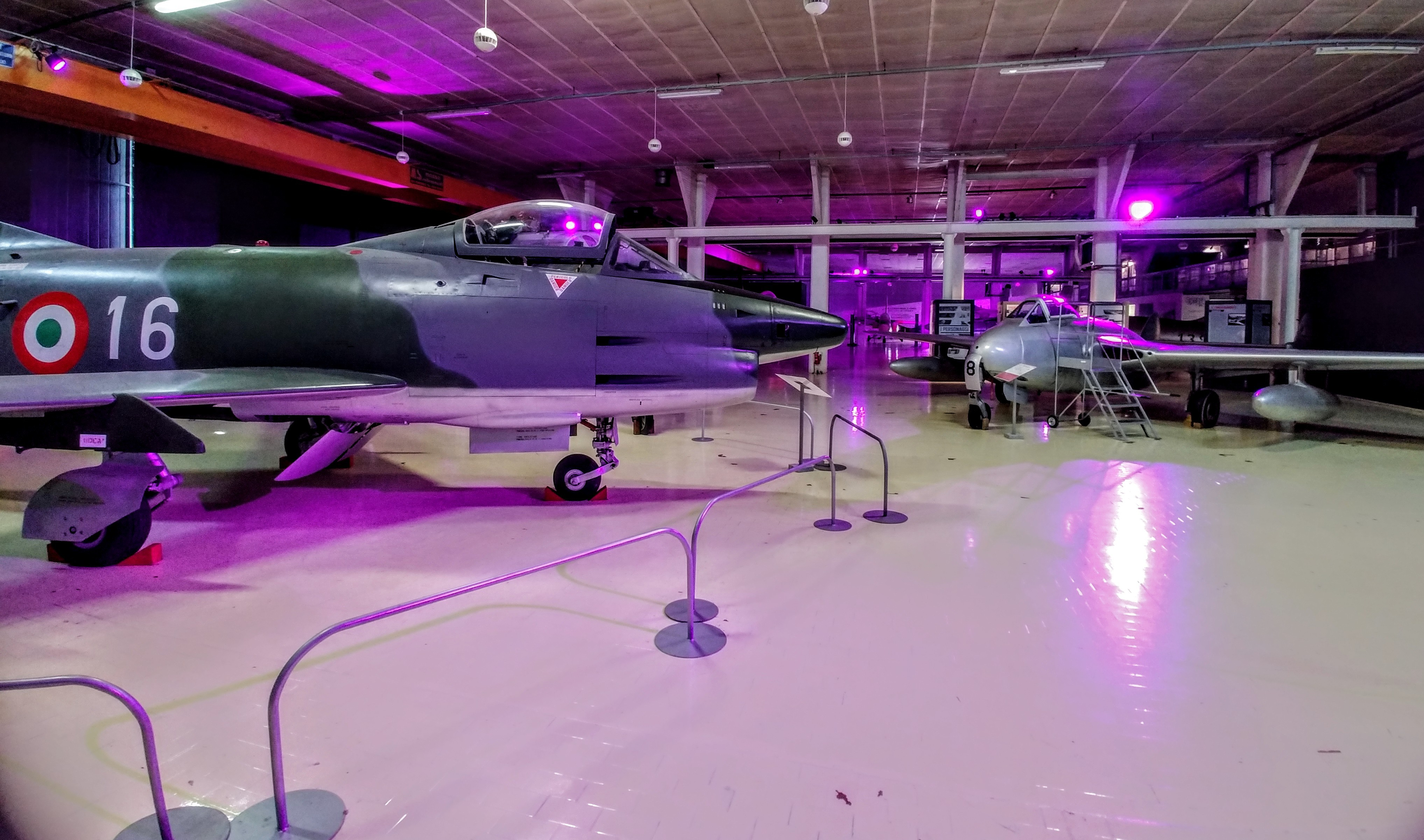 Ingresso della "Galleria degli eroi di Volandia", con G 91 e DH 1000 vampire